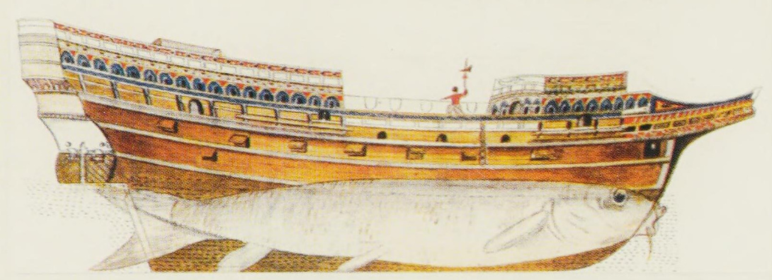 Dessin d'un vaisseau par Matthew Baker montrant l'utilisation du principe de la bionique